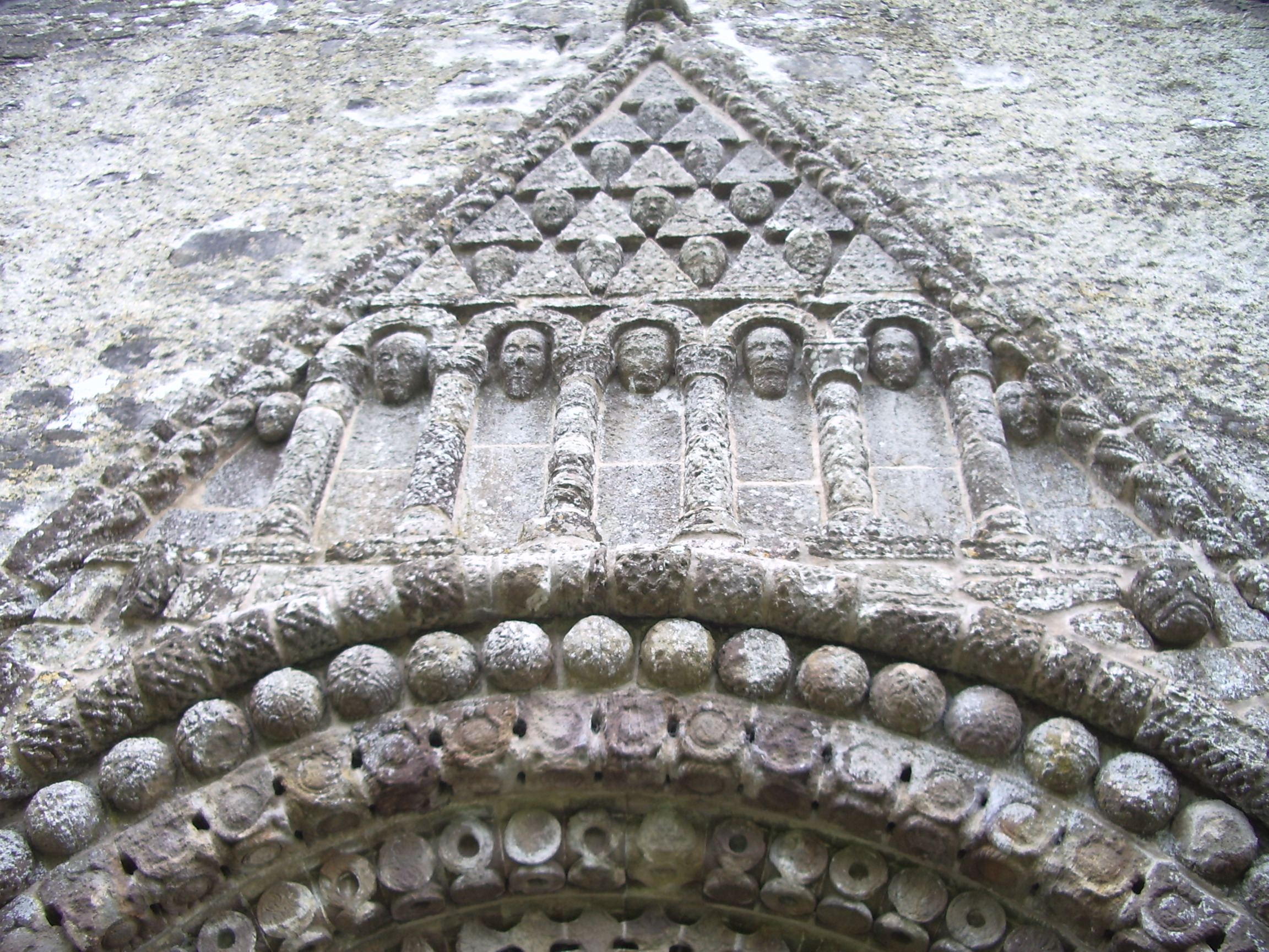 Deatail des Portals, Clonfert Kathedral